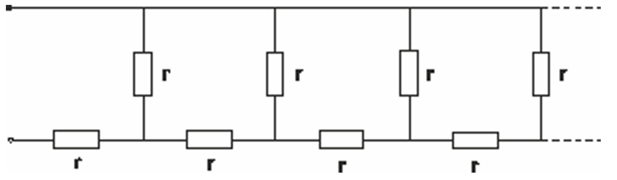 общее сопротивление этой бесконечной цепи равно Фr.